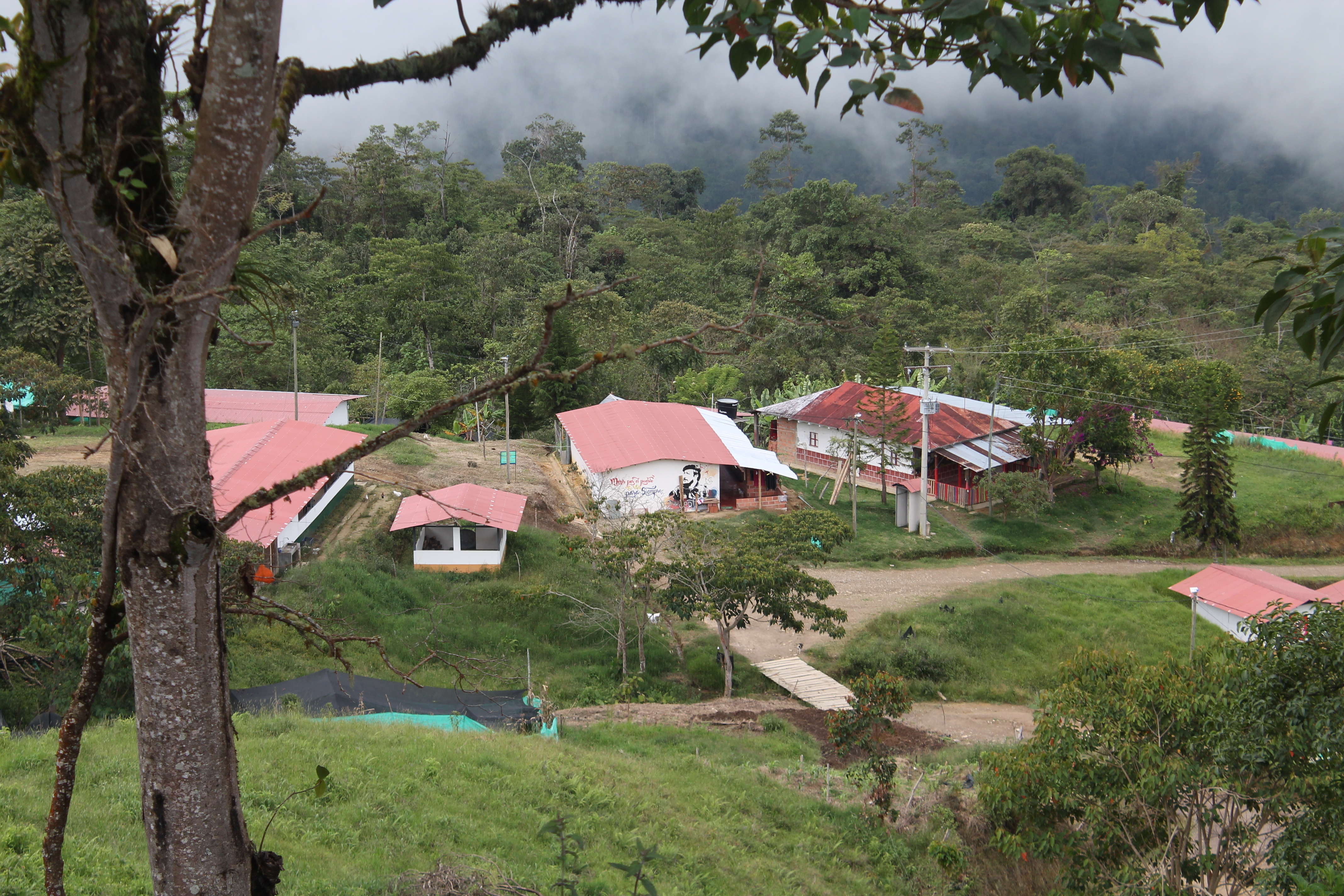 ETCR Antonio Nariño en Iconozo,Tolima. Vereda La Fila